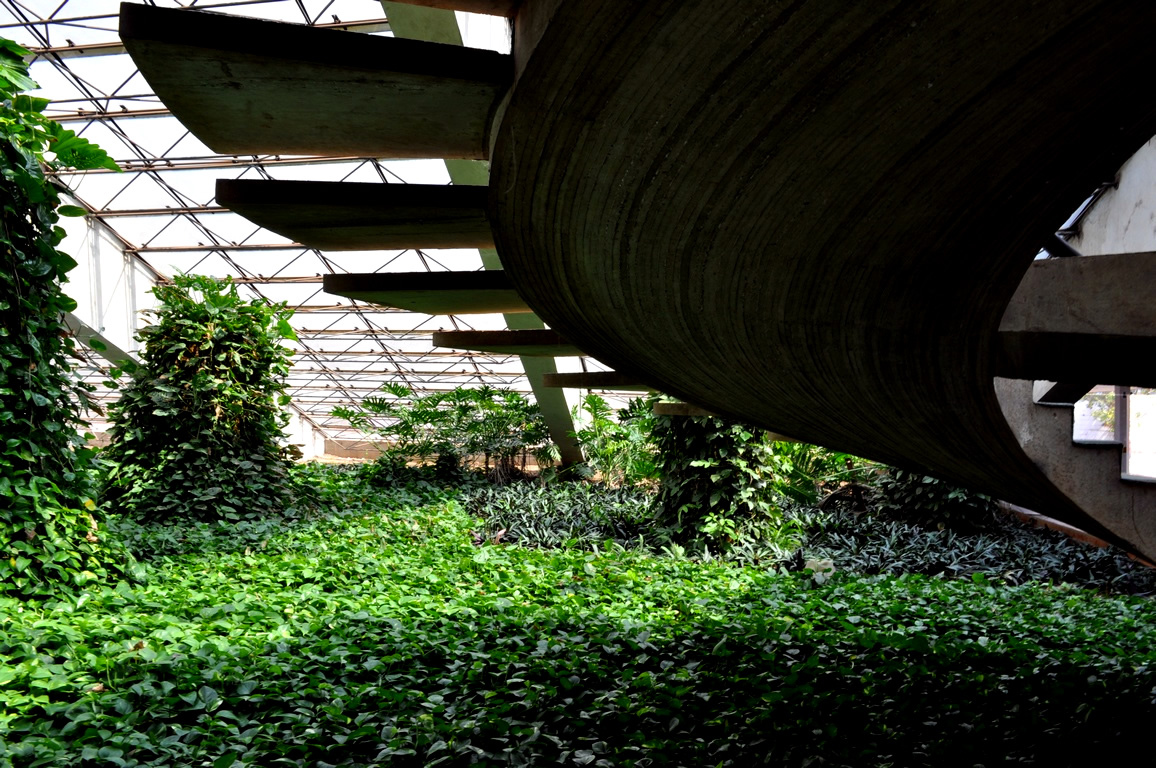 Teatro Nacional de Brasília